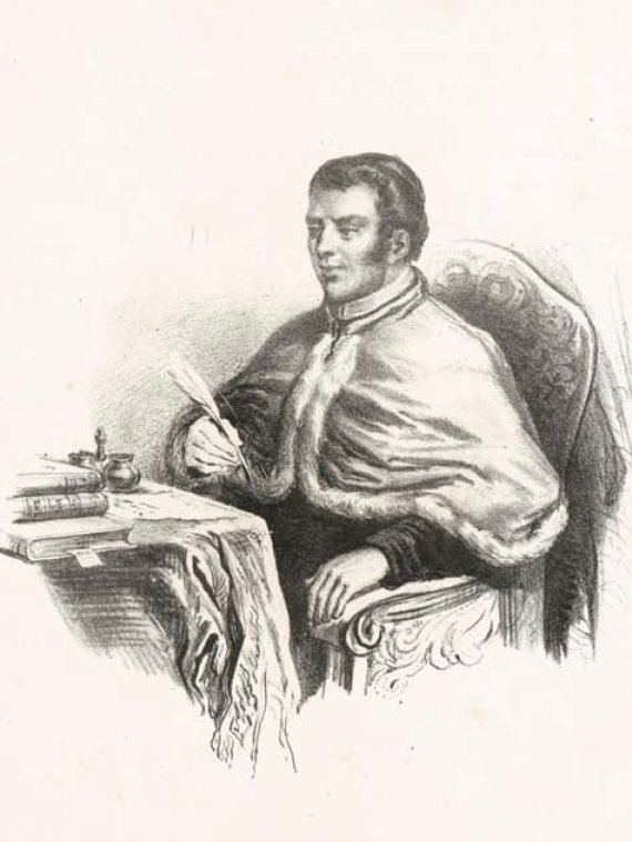 Dal Dizionario biografico degli uomini illustri di Sardegna di Pasquale Tola, 1837